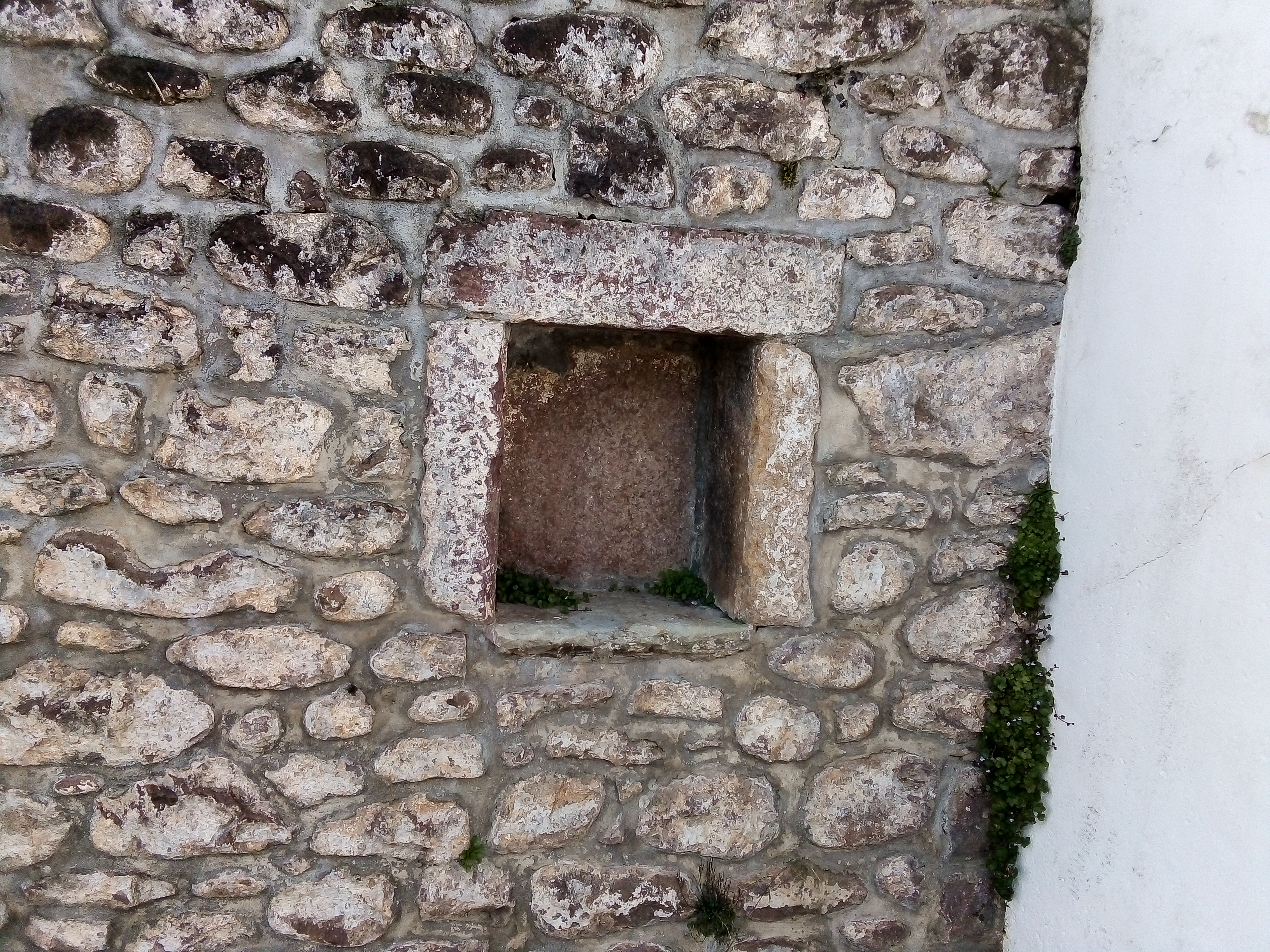 Lamiarrietako pilota plaza.